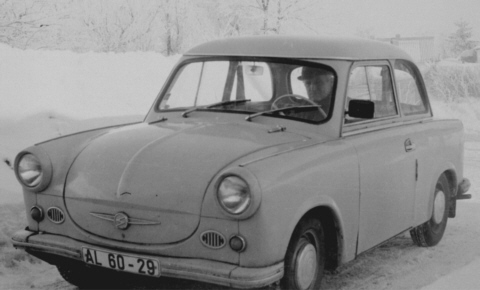 Trabant P50 Baujahr 1959, Foto: Januar 1979 (zum Original geänderte Radkappen und Seitenspiegel) Autor: Autor: Pc-fish aufgenommen im Januar 1979 in Poseritz auf der Insel Rügen EXA 1a mit Zeiss Tessar 2,8/50 ORWO NP20 Negativ-Film s/w, 300dpi gescannt (Graustufen) Nachbearbeitung : Ränder geschnitten (Löschen) (Aktuell) 16:39, 3. Aug 2005 . . Pc fish (Diskussion) . . 480 x 290 (43289 Byte) (* Beschreibung: {Trabant P50 } * Quelle: {Foto } * Fotograf/Zeichner: {D. Moegelin, Jena } * Datum der Aufnahme: {1979 } * Andere Versionen: {- })